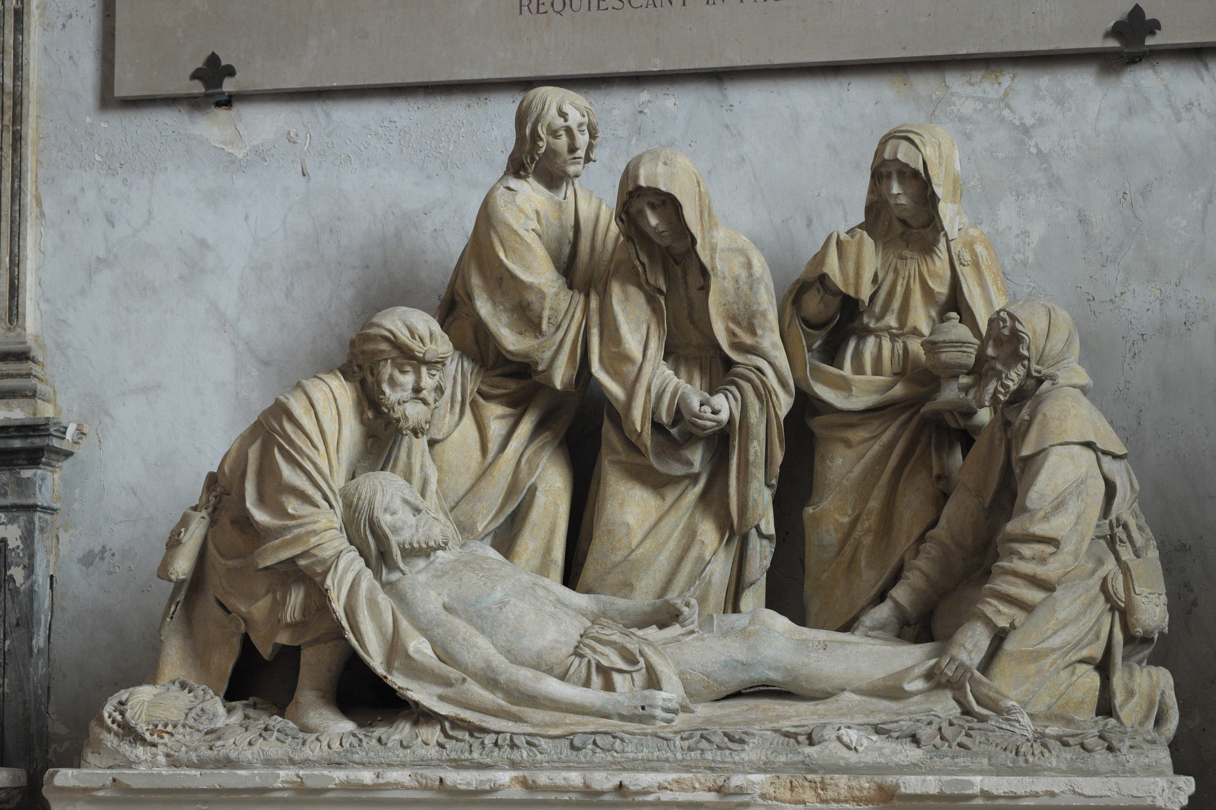 Katholische Kirche Notre-Dame in Villeneuve-l’Archevêque im Département Yonne (Burgund/Frankreich), Grablegung des Meisters von Chaource von 1528